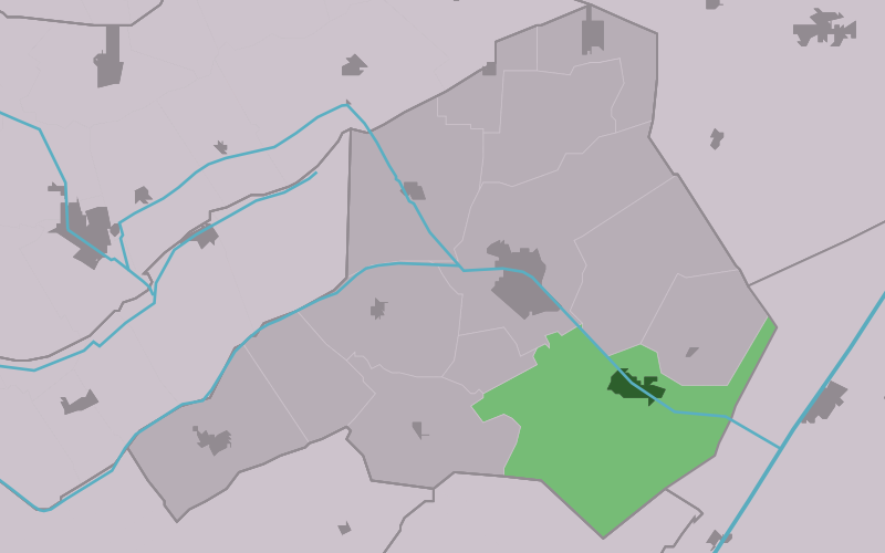 Kaartsje fan himrik fan Appleskea